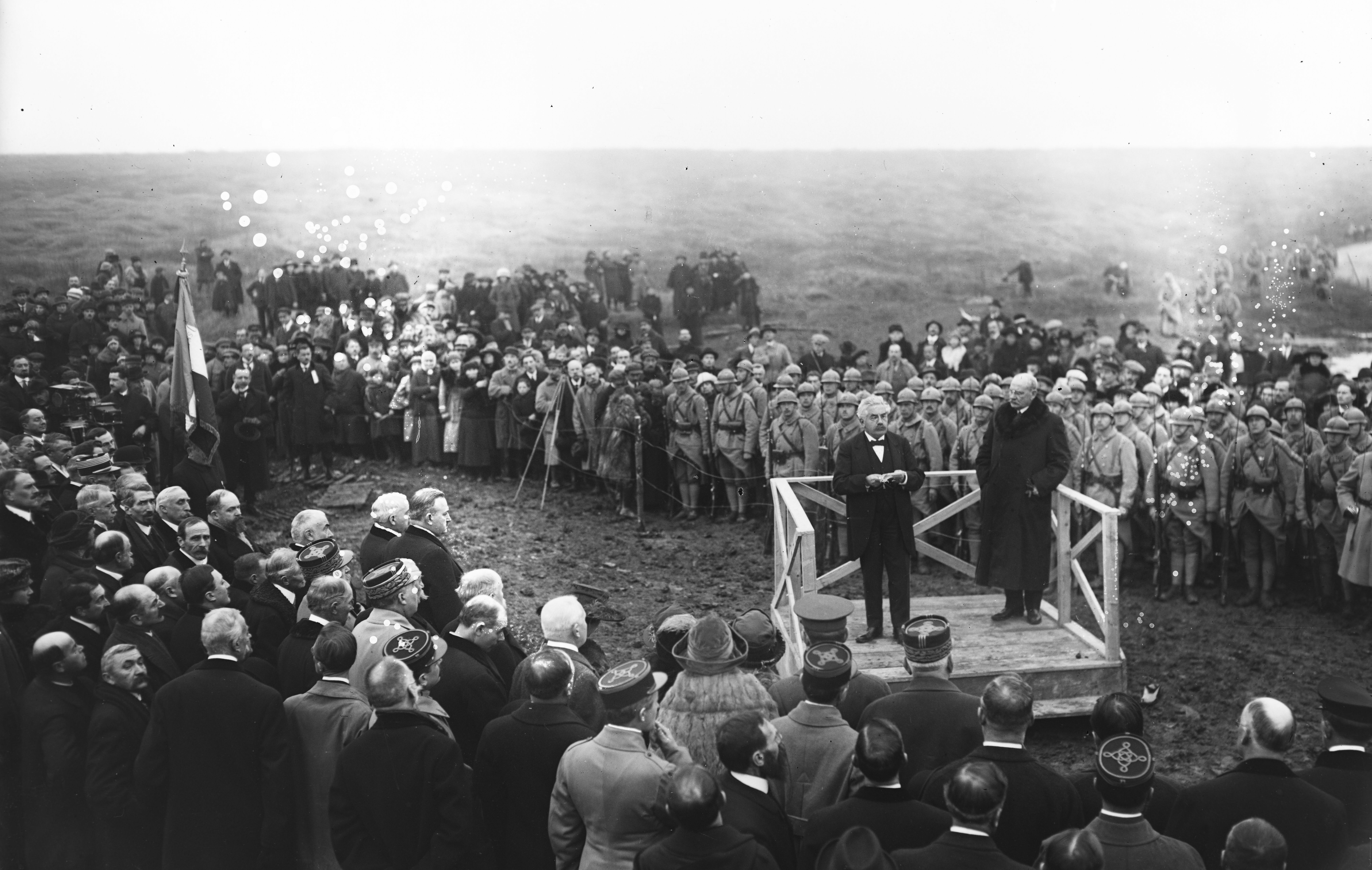 Alexandre Millerand prononçant un discours lors de l'inauguration de la tranchée des baïonnettes (Douaumont, Meuse). Hugh Campbell Wallace est également sur l'estrade.